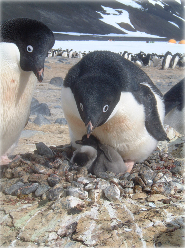 Adelie penguin